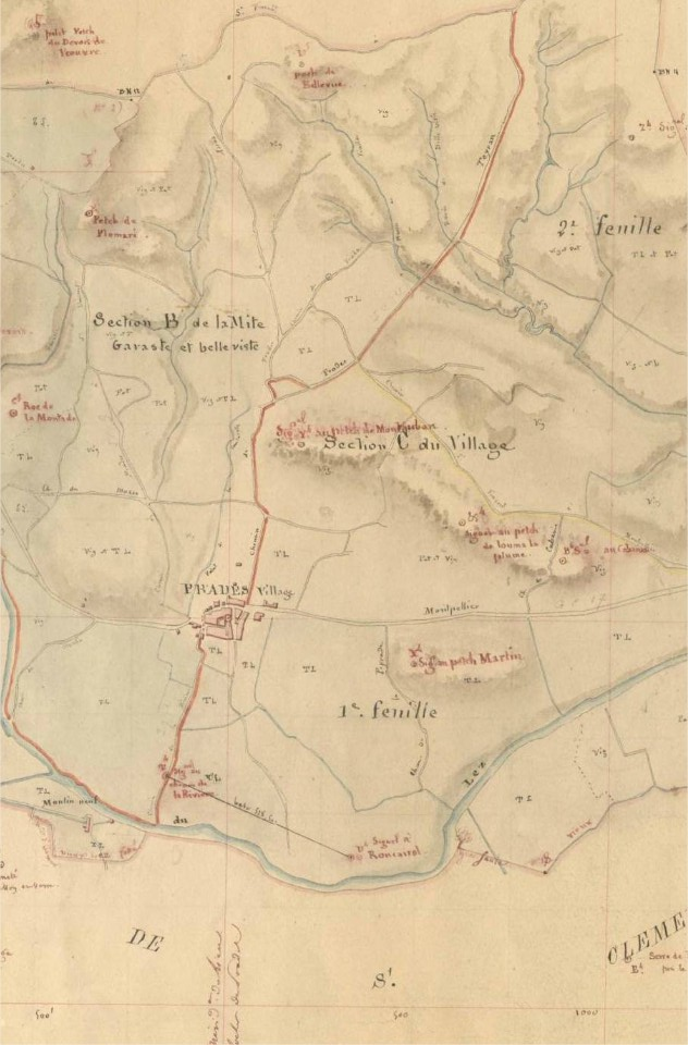 Plan cadastral napoléonien de Prades réalisé en 1832 dont un exemplaire original se trouve aux archives départementales de l'Hérault.